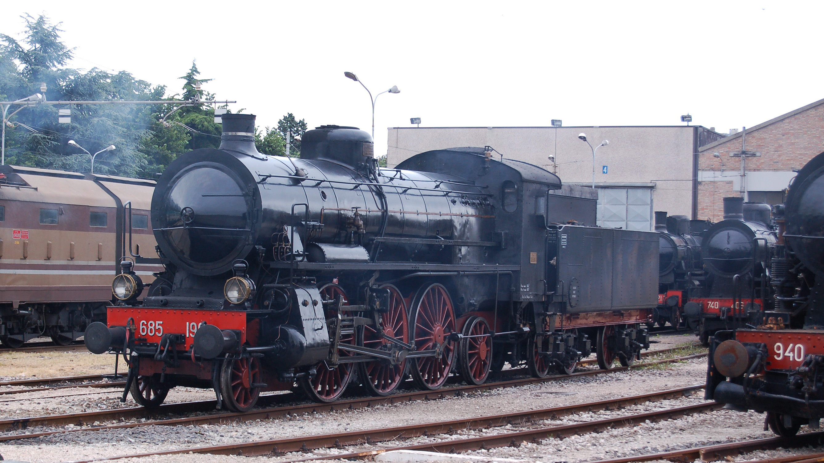 Locomotiva FS Gr685 196 al deposito di Rimini